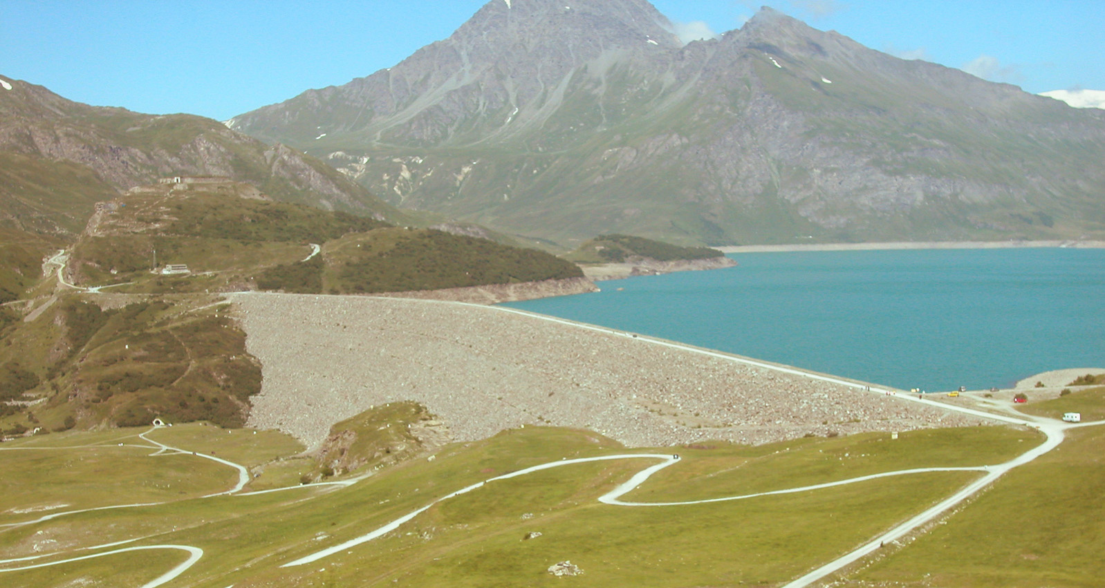 barrage mont cenis